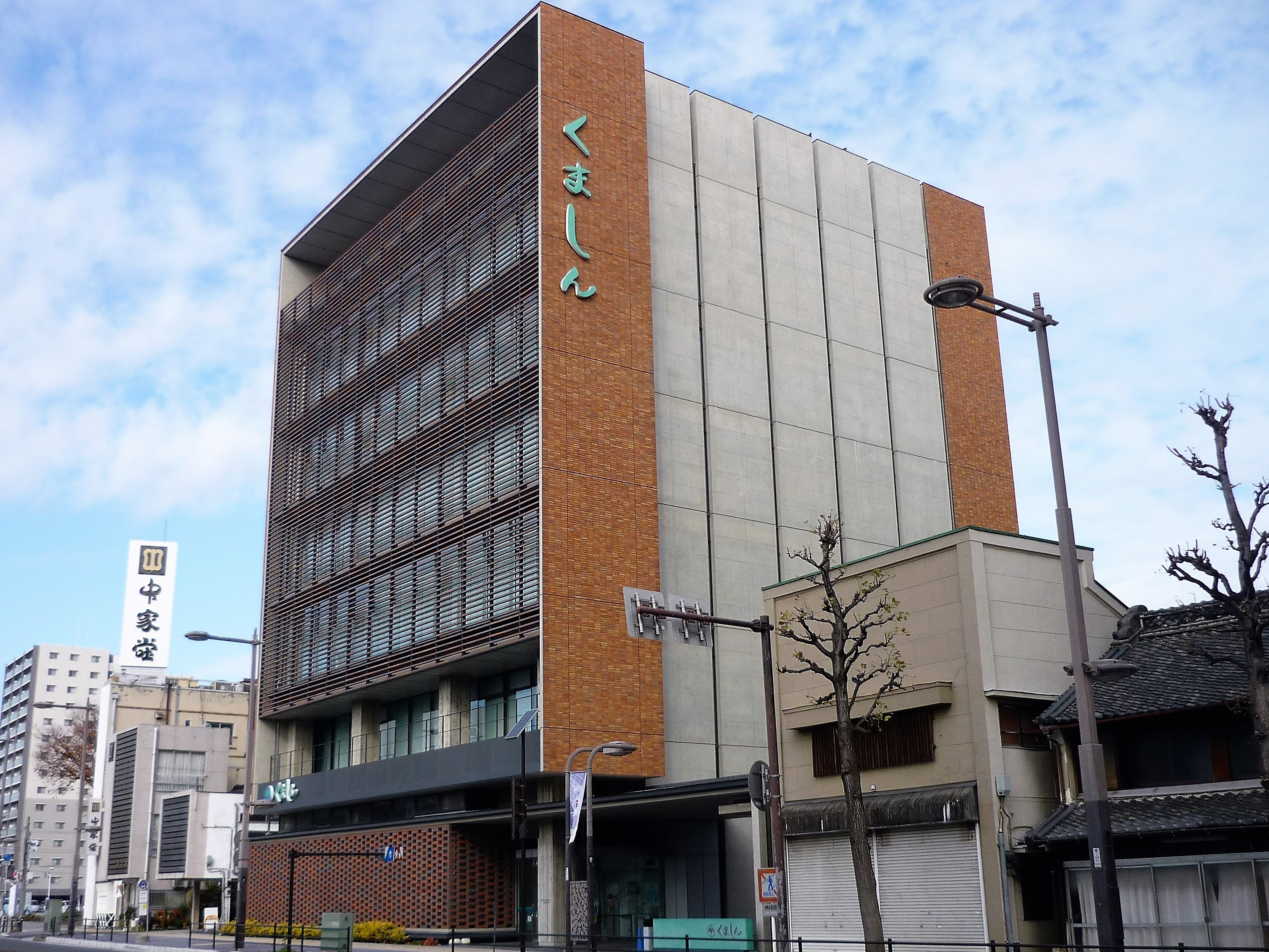 熊谷商工信用組合 本店営業部（熊谷市本町） Panasonic Lumix DMC-FS3